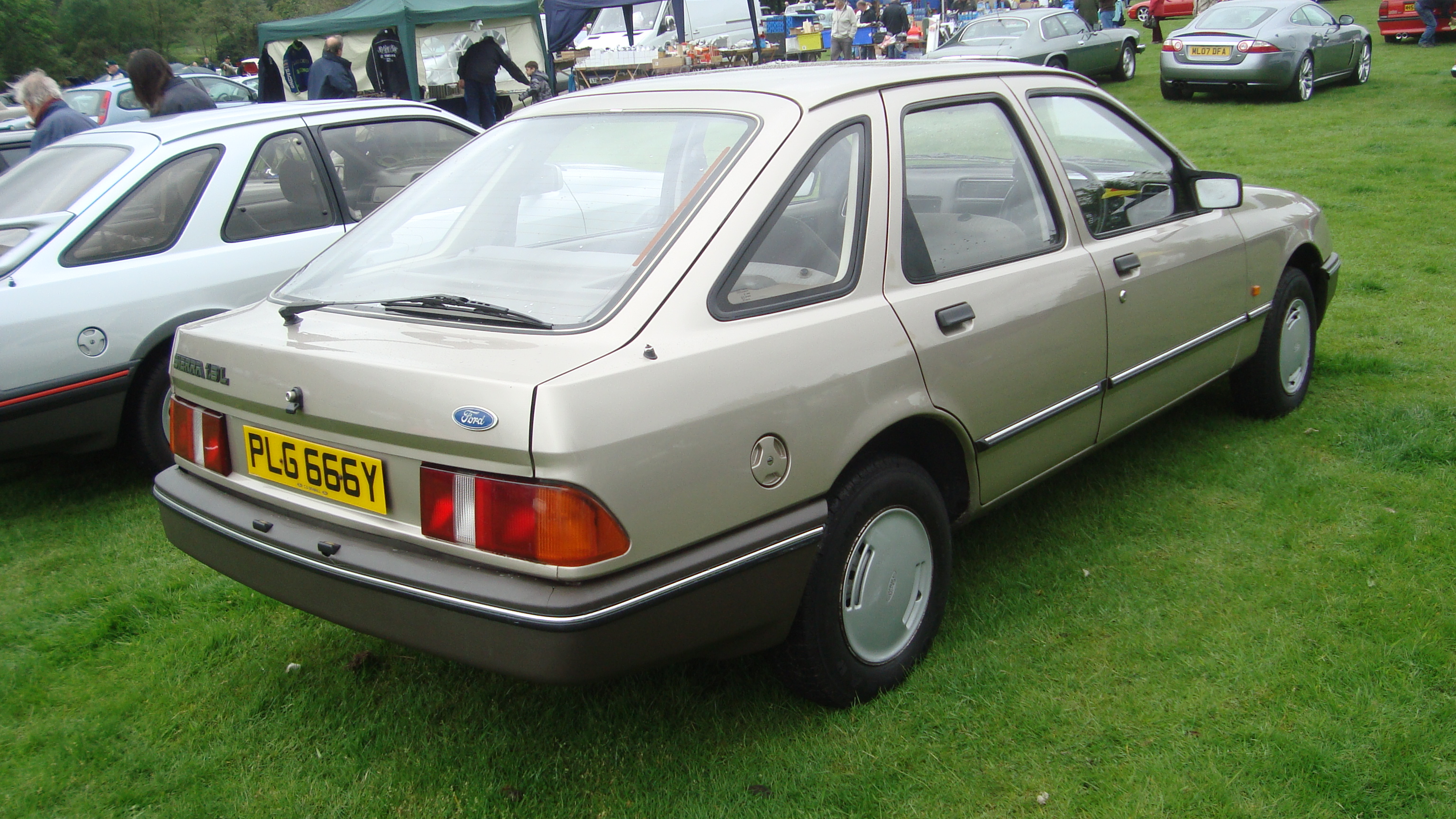 1983 Ford Sierra 1.6 L